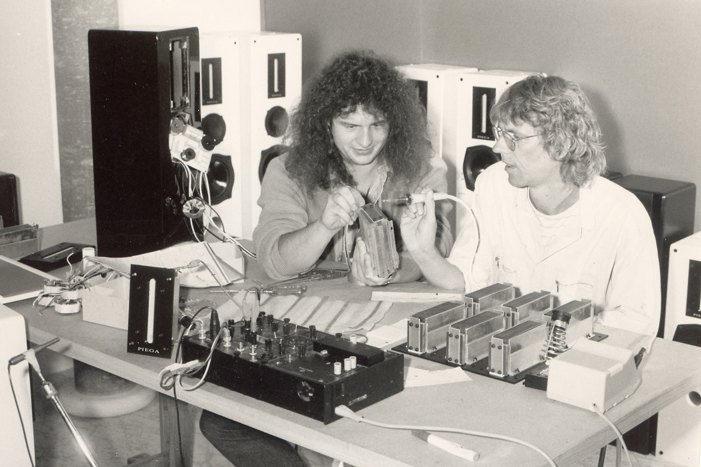 Kurt Scheuch und Leo Greiner, Gründer PIEGA SA